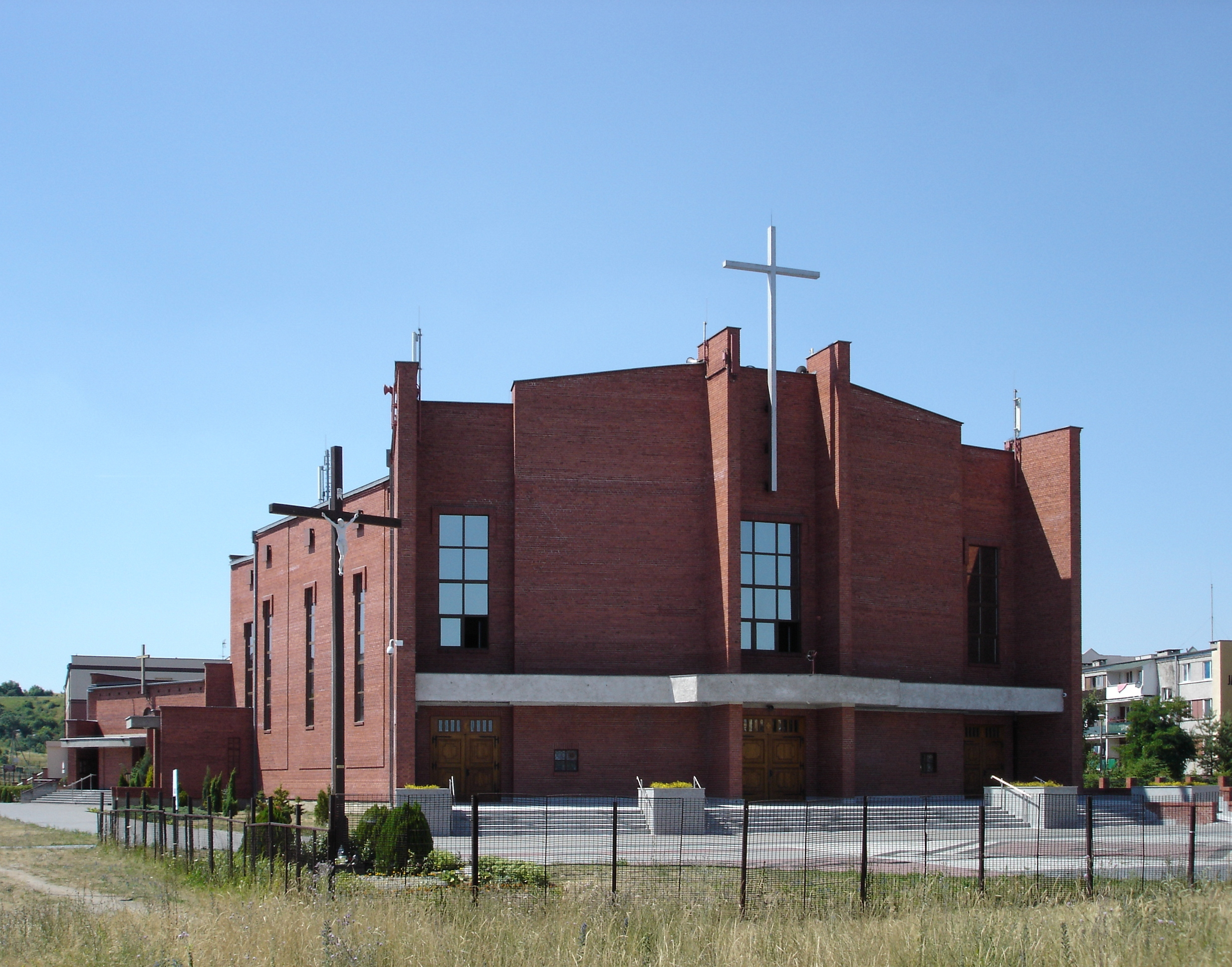 Kościół św. Marka w Bydgoszczy.